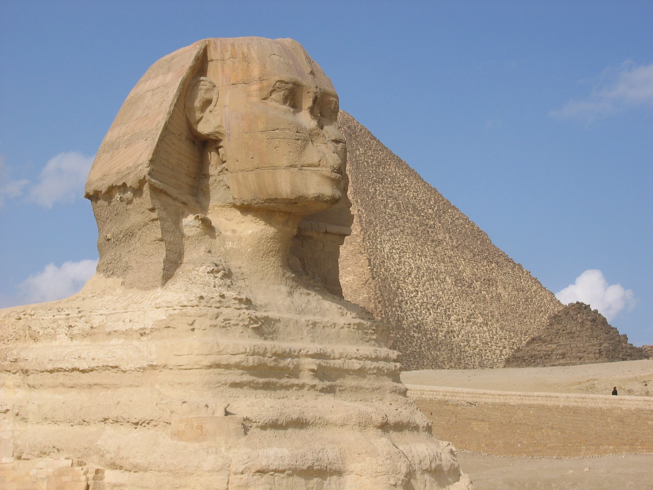 Srpskohrvatski / српскохрватски: Glava Velike Sfinge u Gizi u Egiptu.